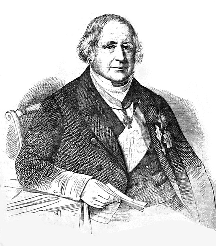 Adam Wilhelm Moltke 1785-1864, dansk politiker.